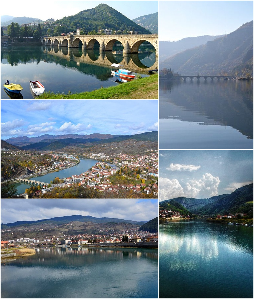 Višegrad